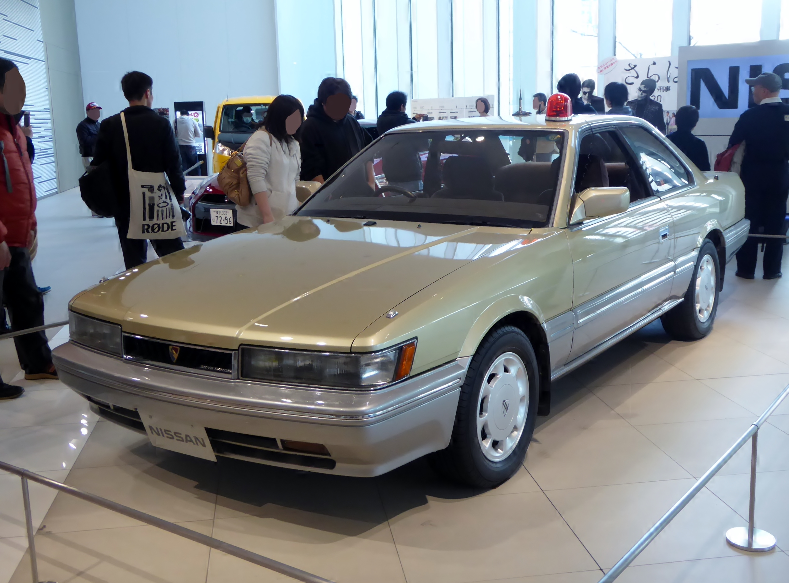 『さらば あぶない刑事』仕様の1987年型日産・レパードアルティマを撮影。劇中では「横浜302 の 45-05」ナンバーとなっているので車体は港303号でナンバーは港302号のもじりと思われる。